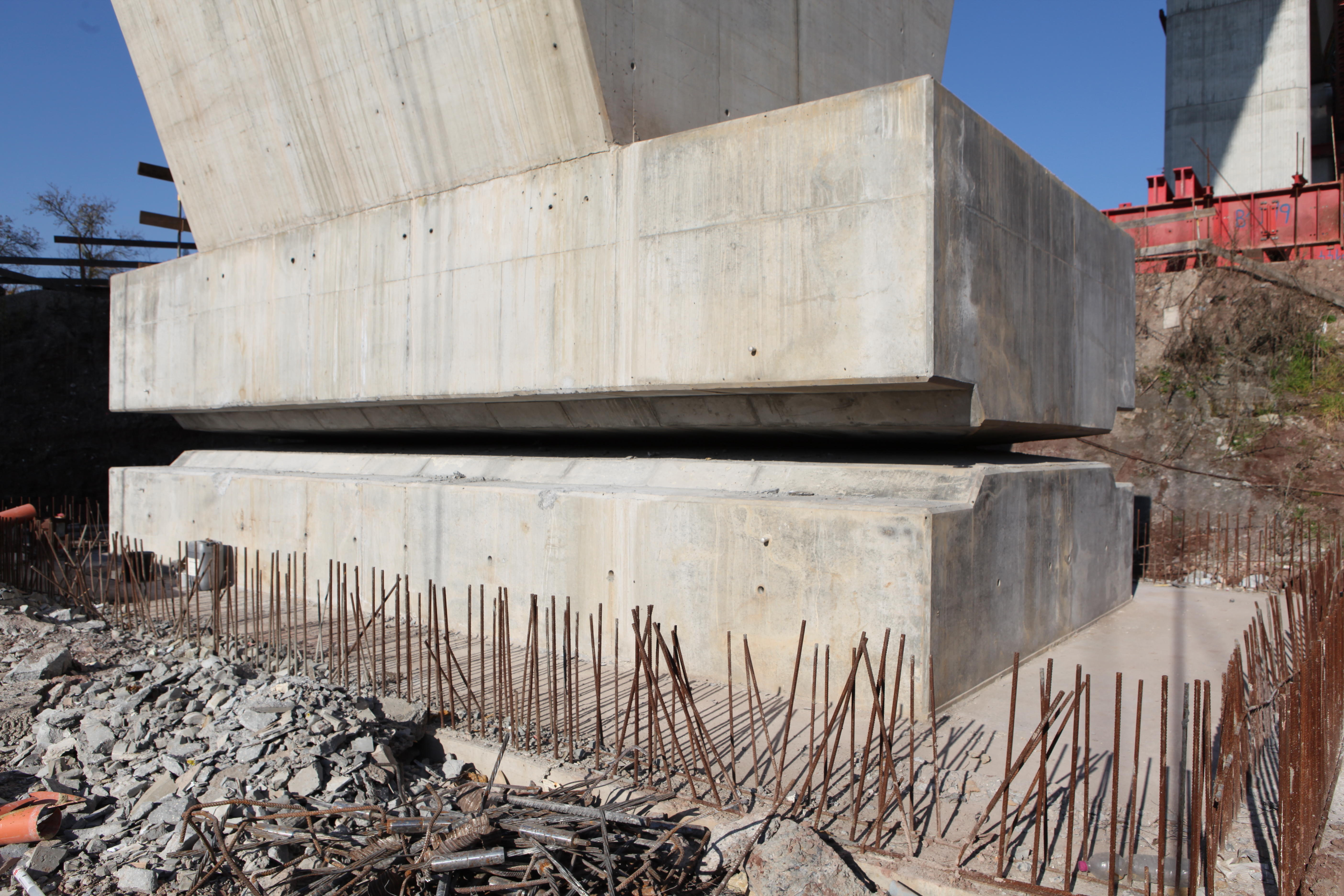 Talbrücke Weißenbrunn am Forst, Betongelenk Nordpfeiler